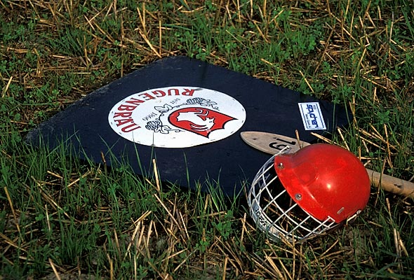 Hornussen: Schindel und Schutzhelm Roland Zumbühl, Arlesheim